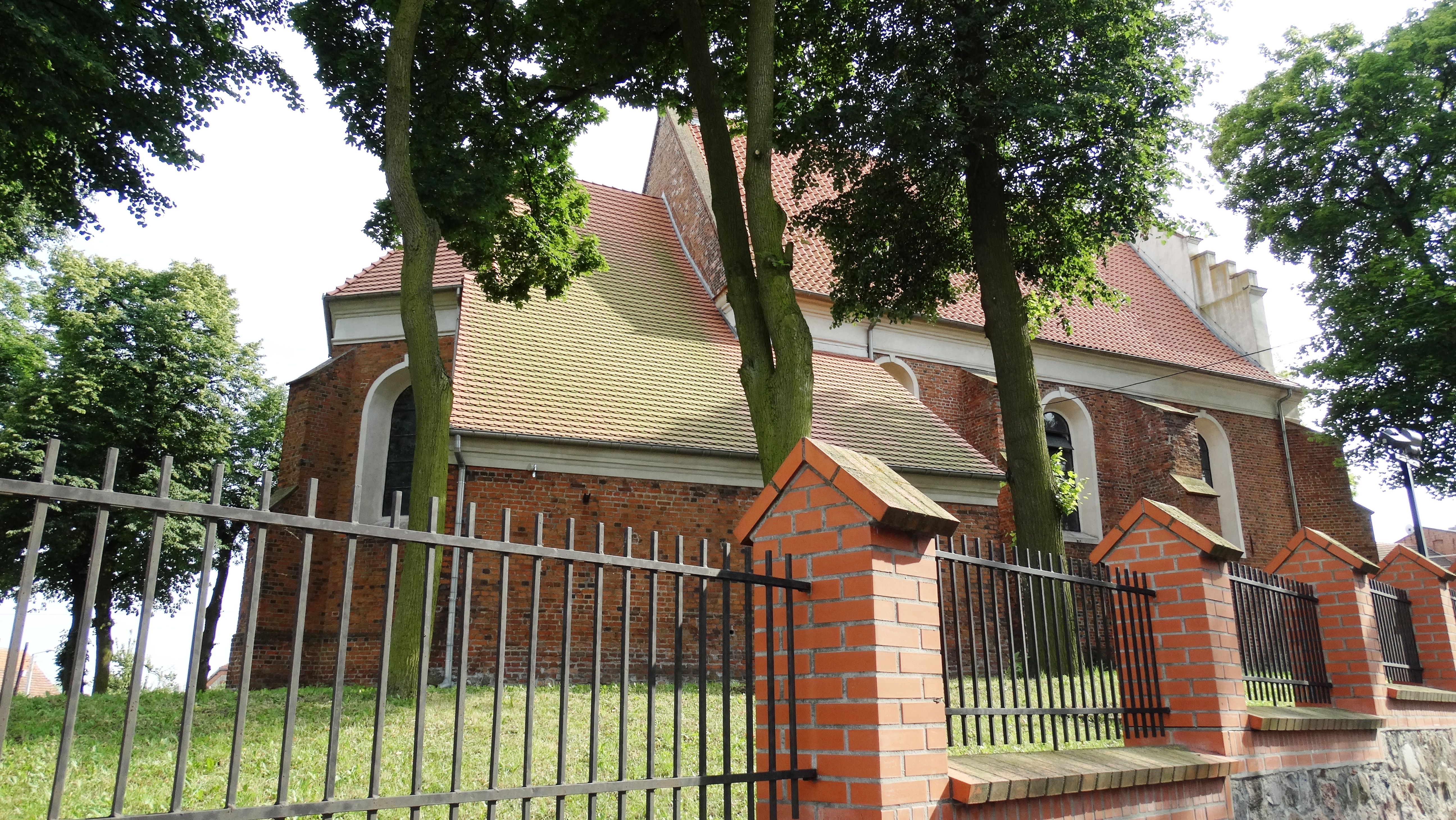 Kcynia, ul. Farna 1 - rzymskokatolicki kościół parafialny pw. św. Michała Archanioła, 1631